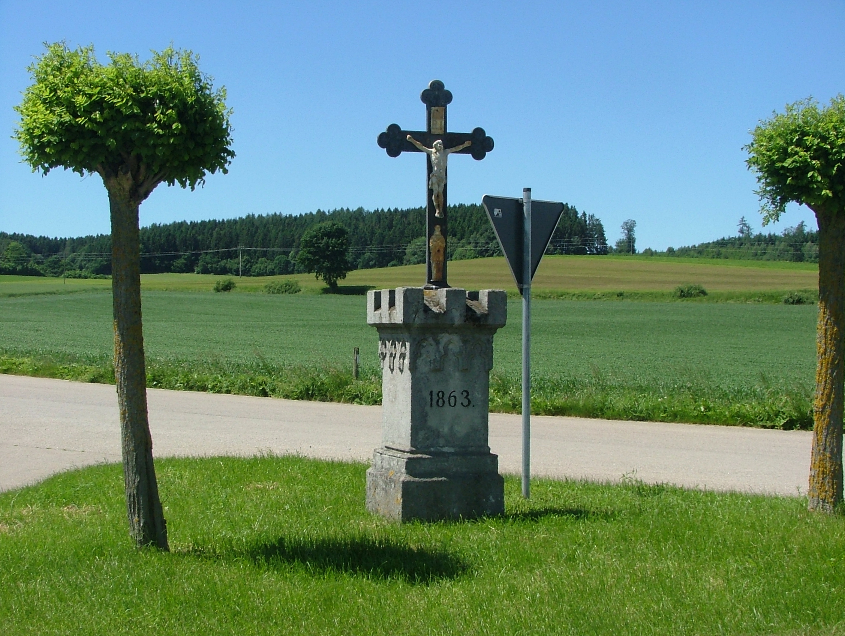 Straßenkreuz